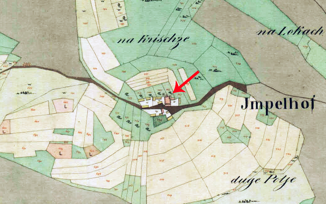 Franciscejski kataster za Kranjsko, 1823-1869